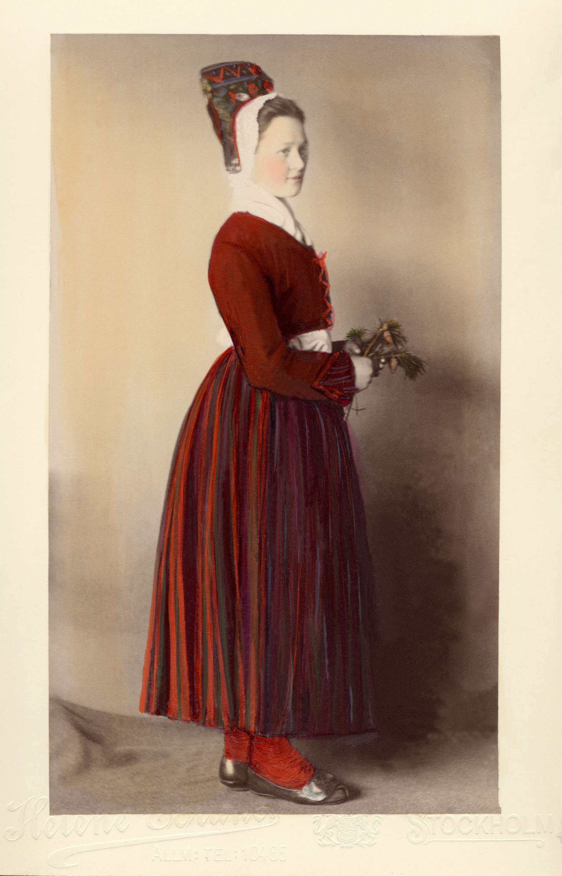 Häverödräkt. Kvinna i helfigur klädd i kyrko- och gilledräkt för gift kvinna. Häverö socken, Uppland. Handkolorerat fotografi. NMA.0043738